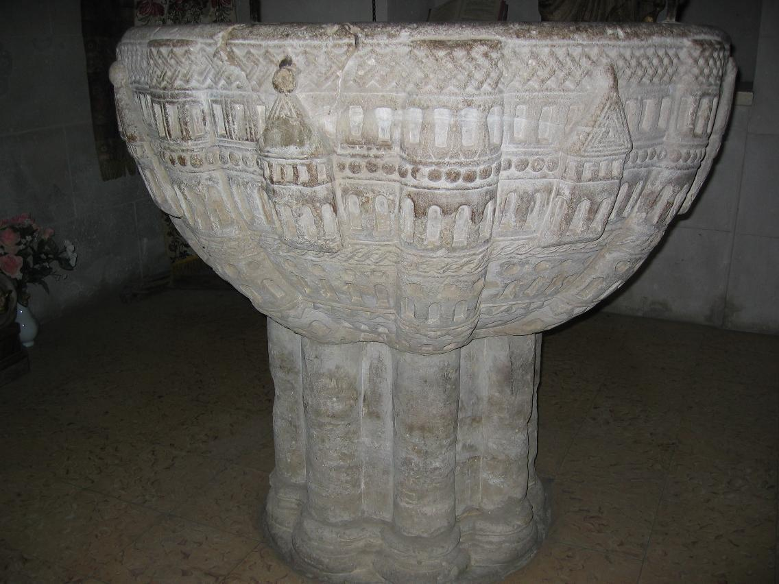 La pila bautismal de Redecilla del Camino (Burgos) está alzada sobre un pie formado por ocho semicolumnas adosadas a un núcleo circular; la parte superior tiene forma de copa con embocadura lobulada. Presenta marcadas influencias mozárabes y bizantinas en su decoración. Esta foto participó en el juego En un lugar de Flickr.